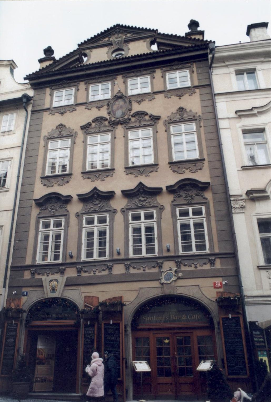 Česky: Valkounský dům v Praze na Malé straně